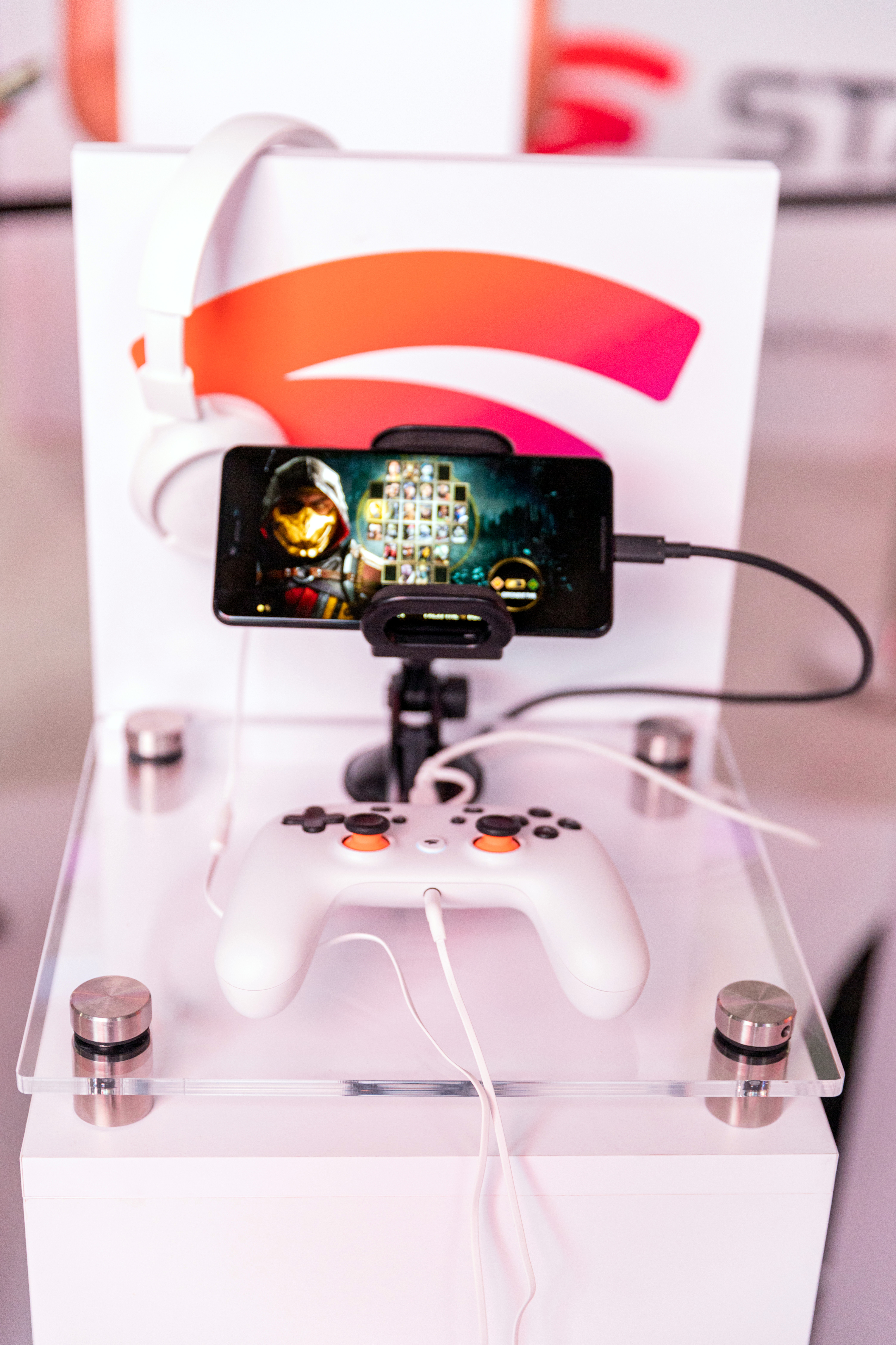 Google Stadia Cloud gaming